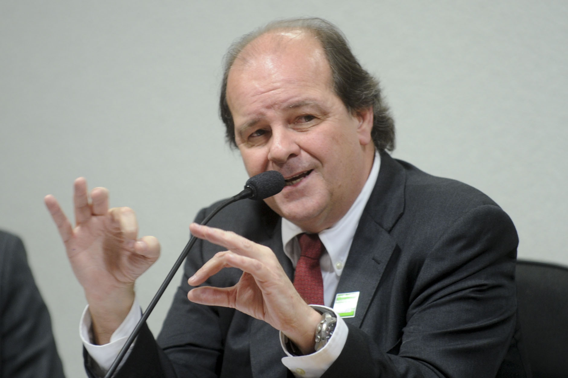 CPI Mista da Petrobras ouve o ex-diretor da área internacional da estatal, Jorge Luiz Zelada (foto). Ele foi convocado para explicações sobre a compra da refinaria de Pasadena, nos Estados Unidos. Foto: Marcos Oliveira/Agência Senado